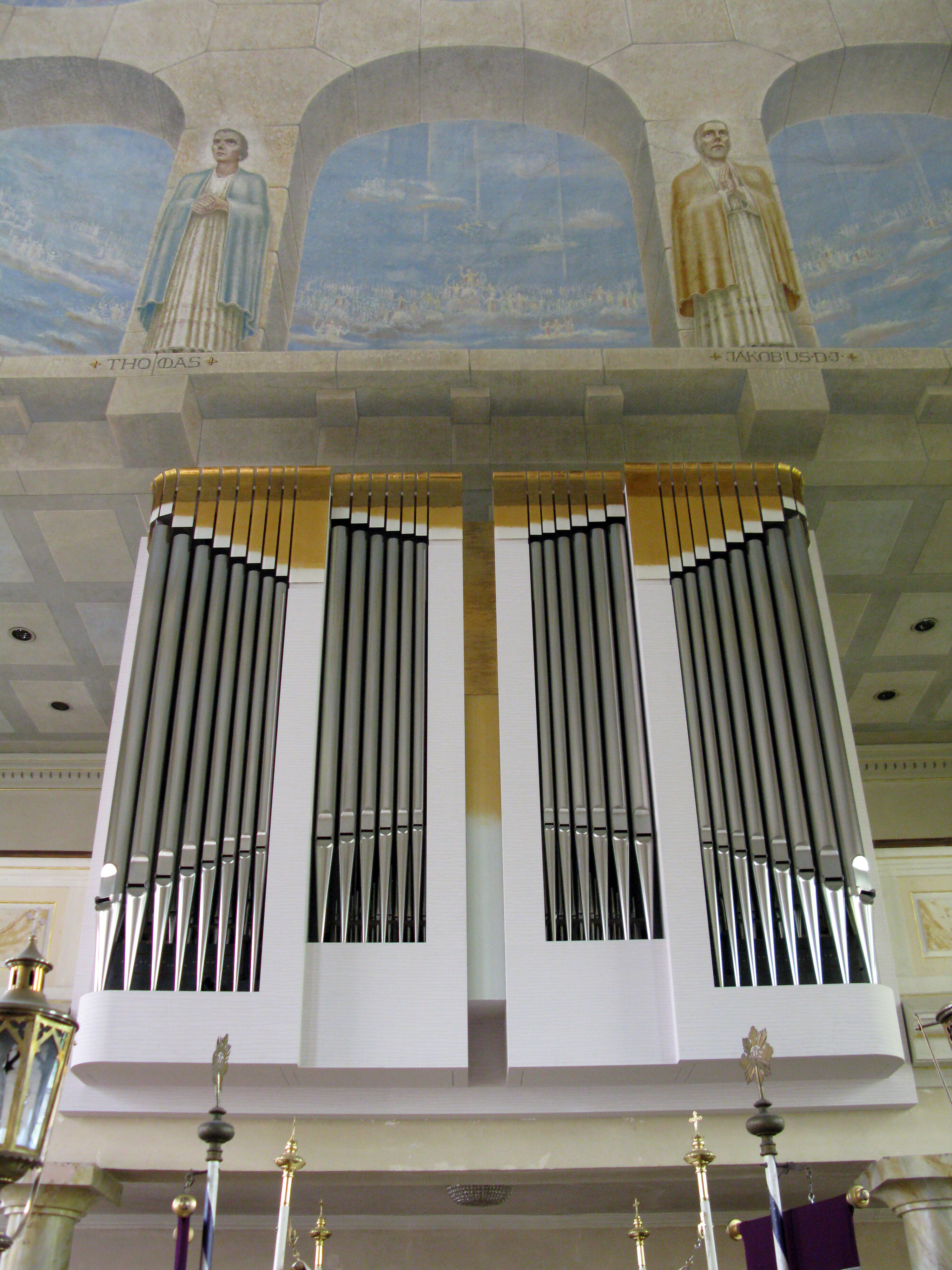 Winterhalter-Orgel in St. Blasius in Freiburg, geweiht 14. April 2013